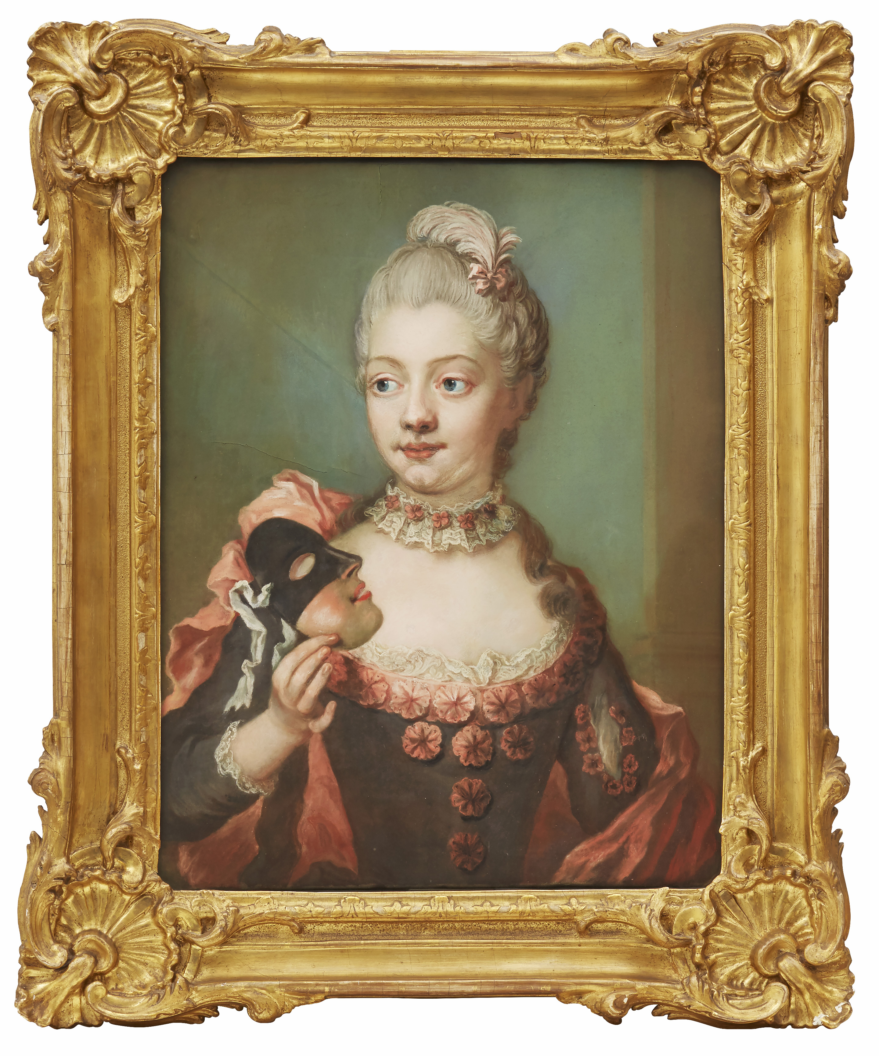 Porträtt av Riksrådinnan grevinnan Brita Christina Wrede Sparre (1741-1766). Pastell, 64 x 50 cm. Högklassig originalram i rokoko. Avporträtterad av Gustaf Lundberg 1695‑1786. Med påskrift a tergo: ”Rixrådinnan Sparre född Grefvinnan Wrede samt gift med Rixkanslern grefve Fredrik Sparre.” Grevinnan Brita Wrede Sparre (1741-1766) var Carl Gustaf Tessins (1695-1770) systerdotter, som gifte sig med Greve Fredrik Sparre (1731-1803), Ulla Sparre Tessins (1711-1768) brorson. Registrerad i Svenskt porträttarkiv nr. 1922:690. Se Index över svenska porträtt 1500‑1850, band II. Proveniens: Greve Carl Gustaf Tessins (1695‑1770) samling, Åkerö slott, Bettna socken, Södermanland. Friherre Bo Leijonhufvuds (1868-1952) samling.